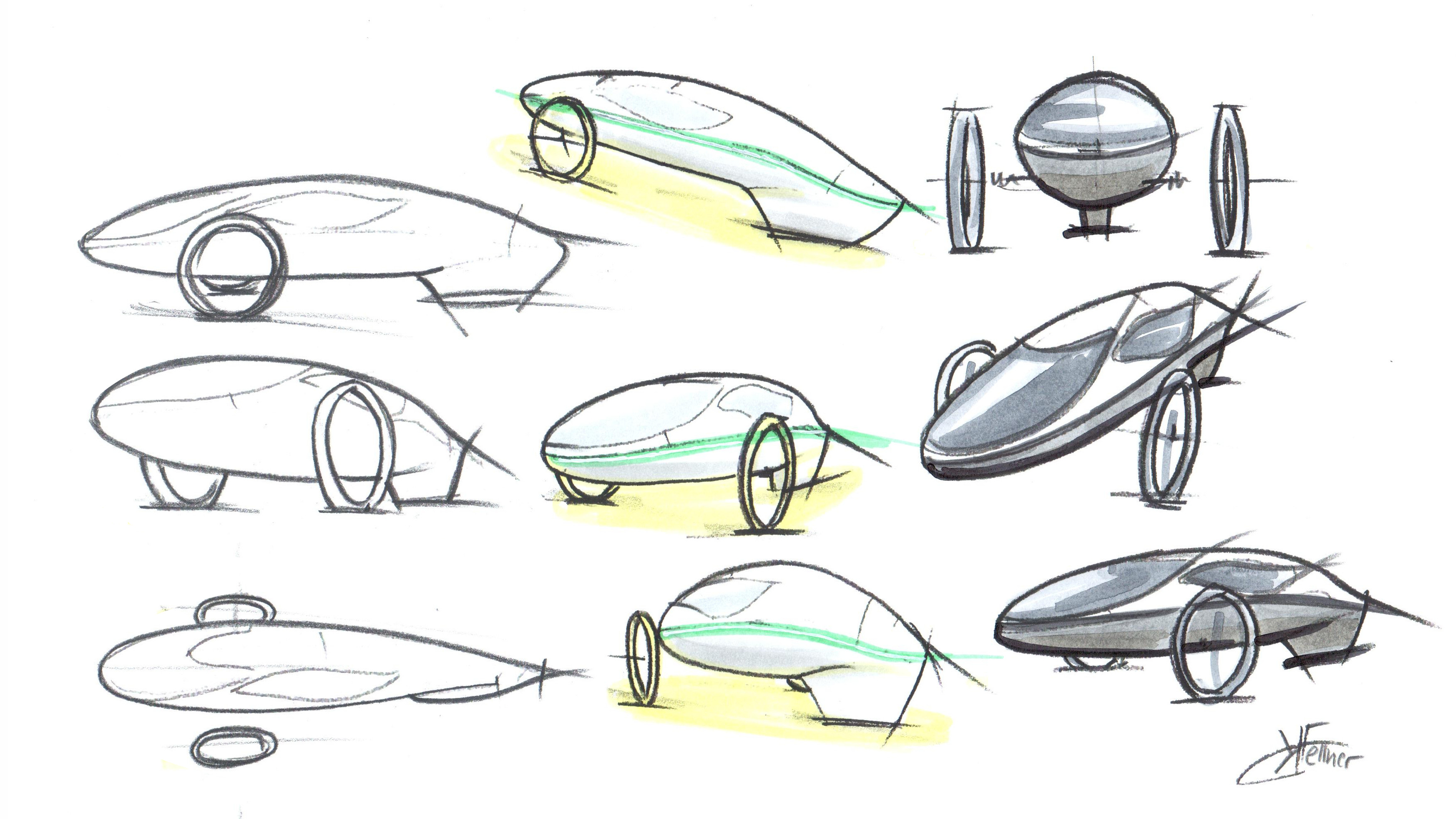 Konzeptzeichung Fennek 2017 - Fellner